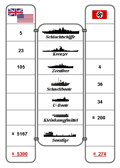 Kräfteverhältnis bei der Operation Neptune zwischen Alliierten und Kriegsmarine in der Normandie am 6. Juni 1944